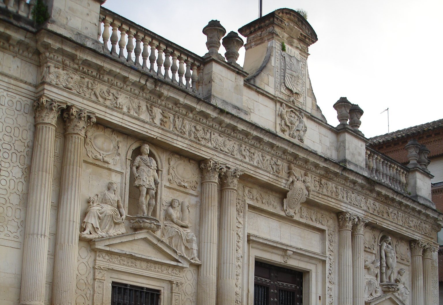 Ayuntamiento Antiguo de Jerez (Spain)